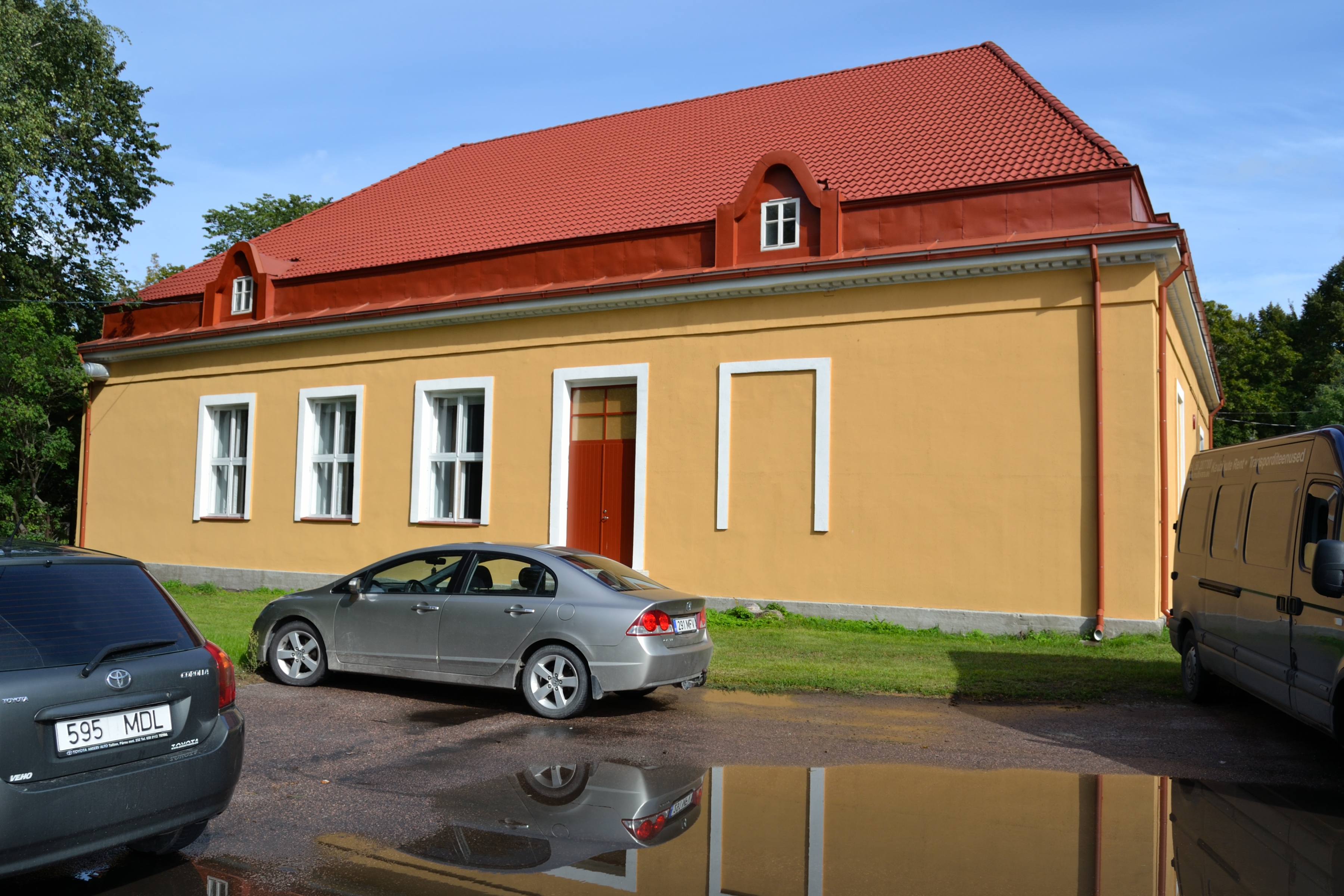 Tallinn, Seewaldi vaimuhaigla seltskondlik maja Paldiski mnt 52-7, 1912